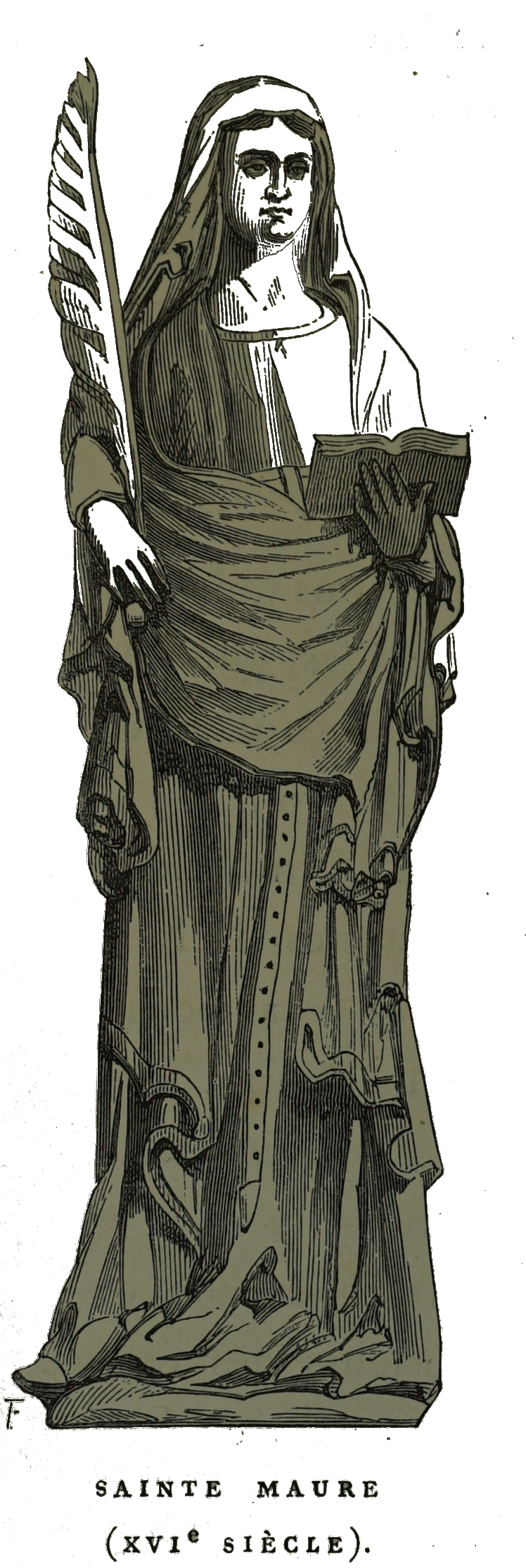 par un dessin de Fichot.